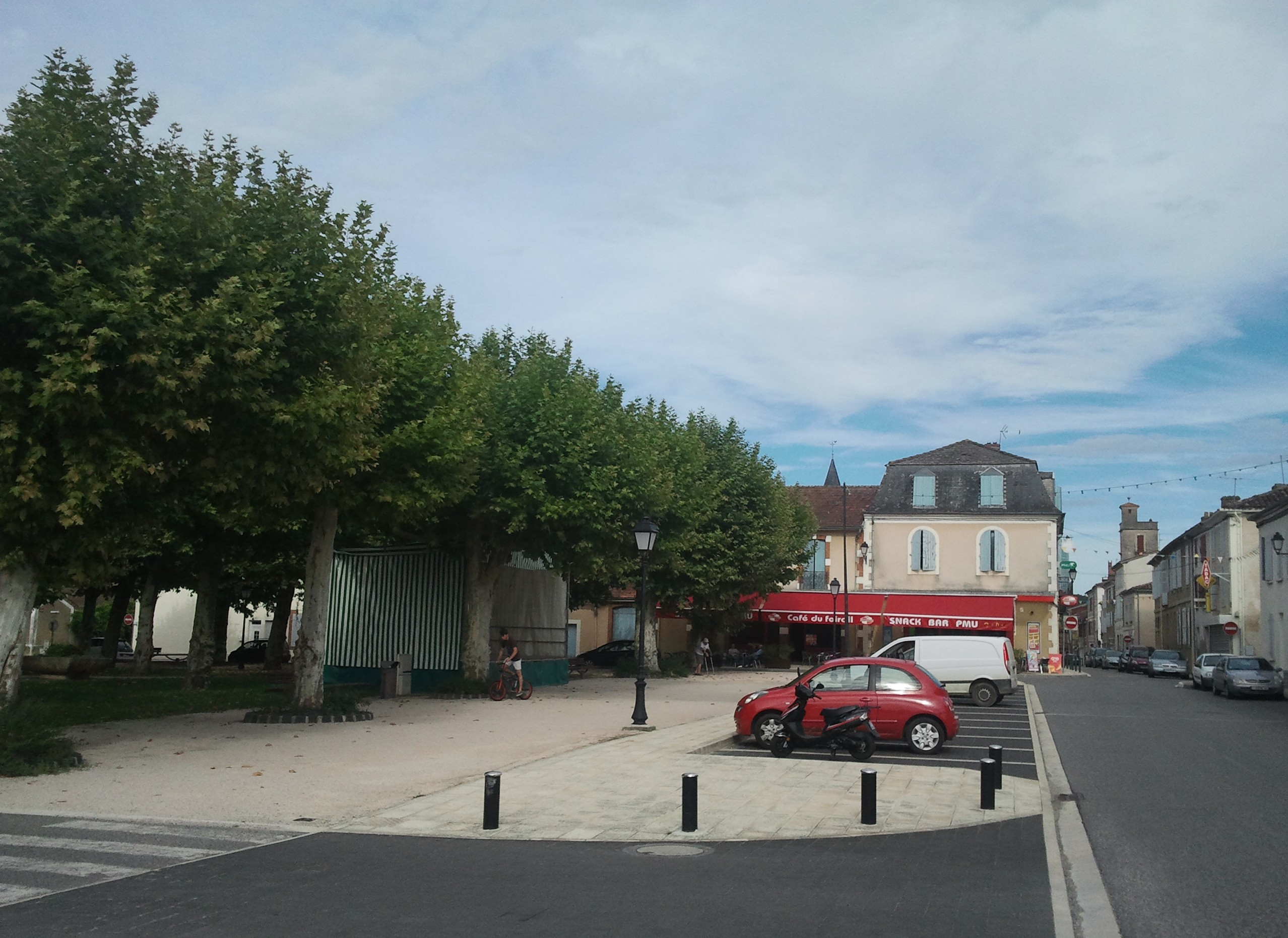 Place du Foirail à Masseube